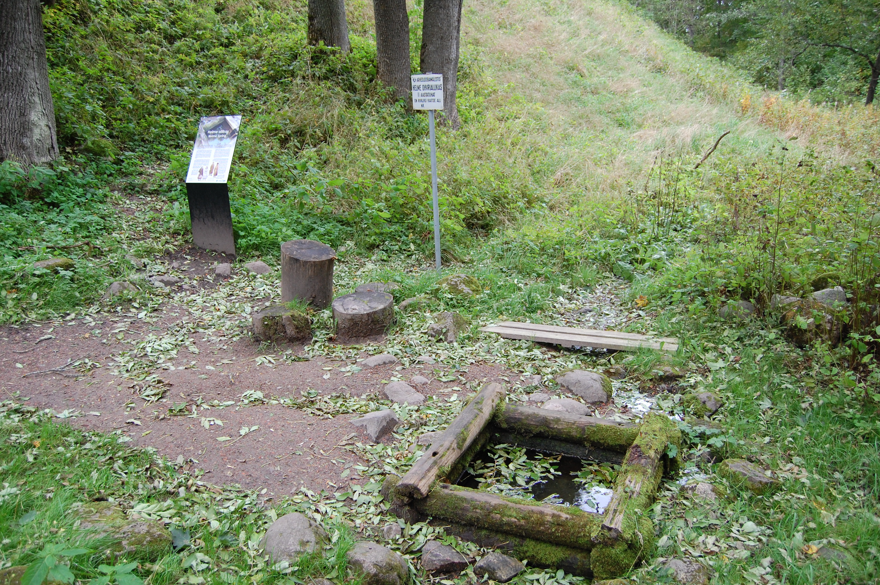 arheoloogiamälestis, asub Helme ordulinnuse lõuna pool, ida küljes